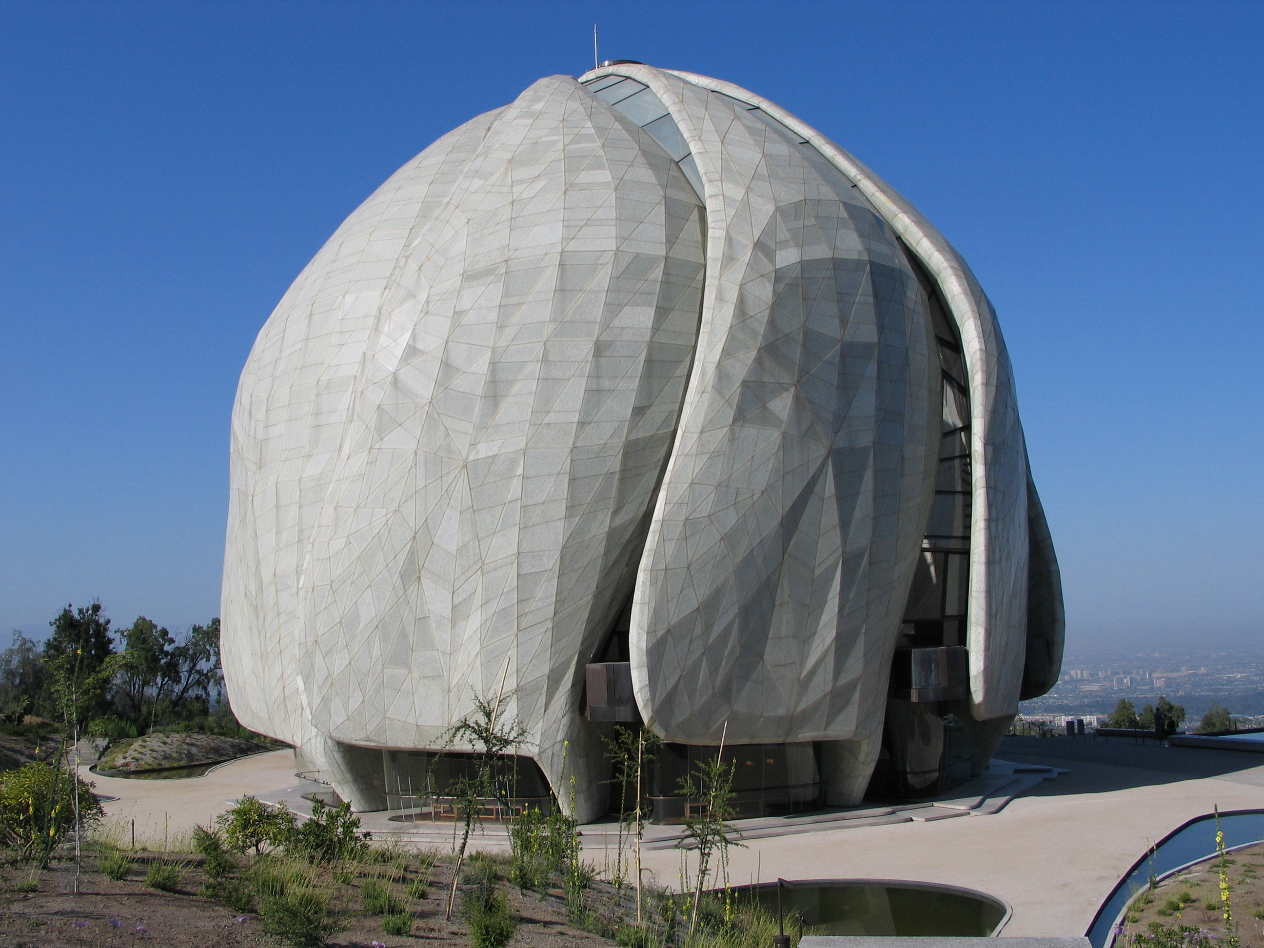 Templo Bahá'i en Peñalolén, Santiago de Chile. El primero en latinoamerica inagurado en el año 2016. Su construcción es de estructura metálica con piezas de mármol y cristales